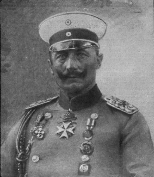 Kaiser Wilhelm II.